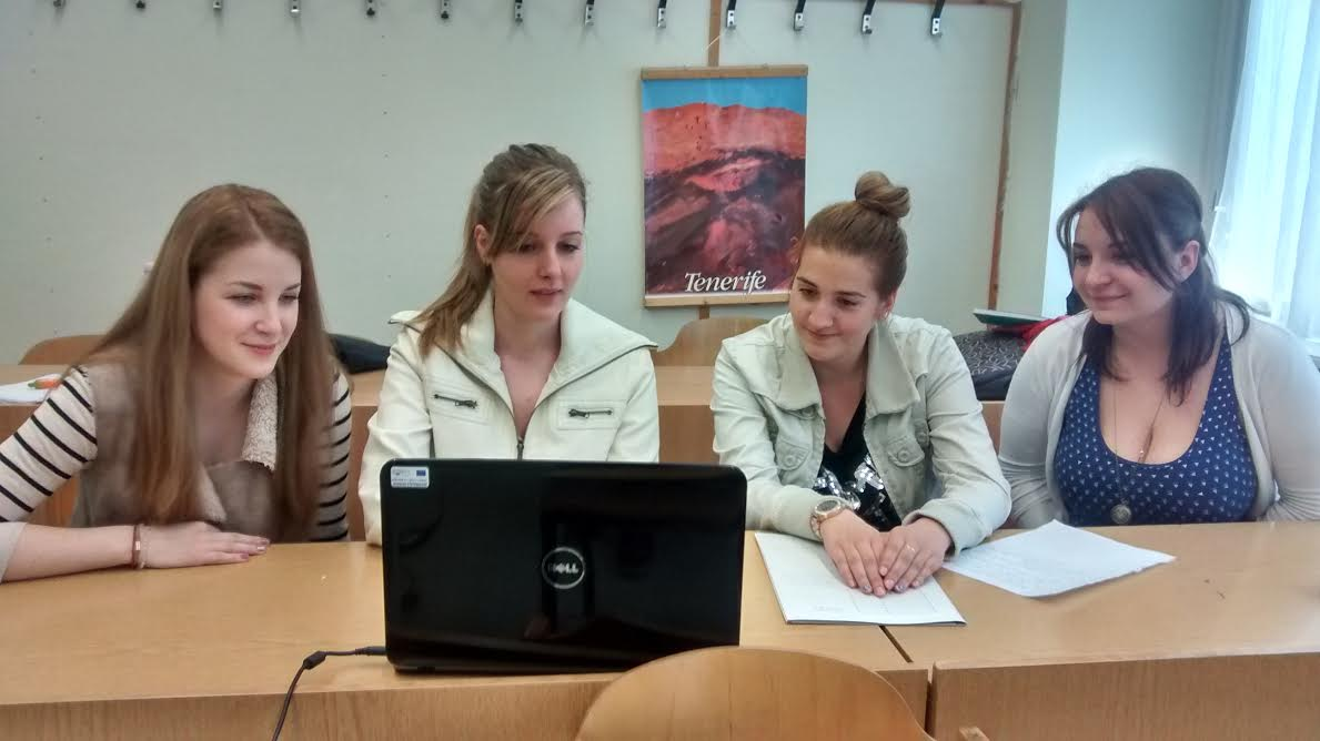 Viquimarató Ramon Llull a Szeged, Hongria